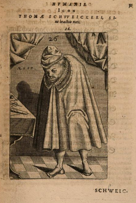 Thomas Schweicker in einem Buch von Johann-Georg Schenck